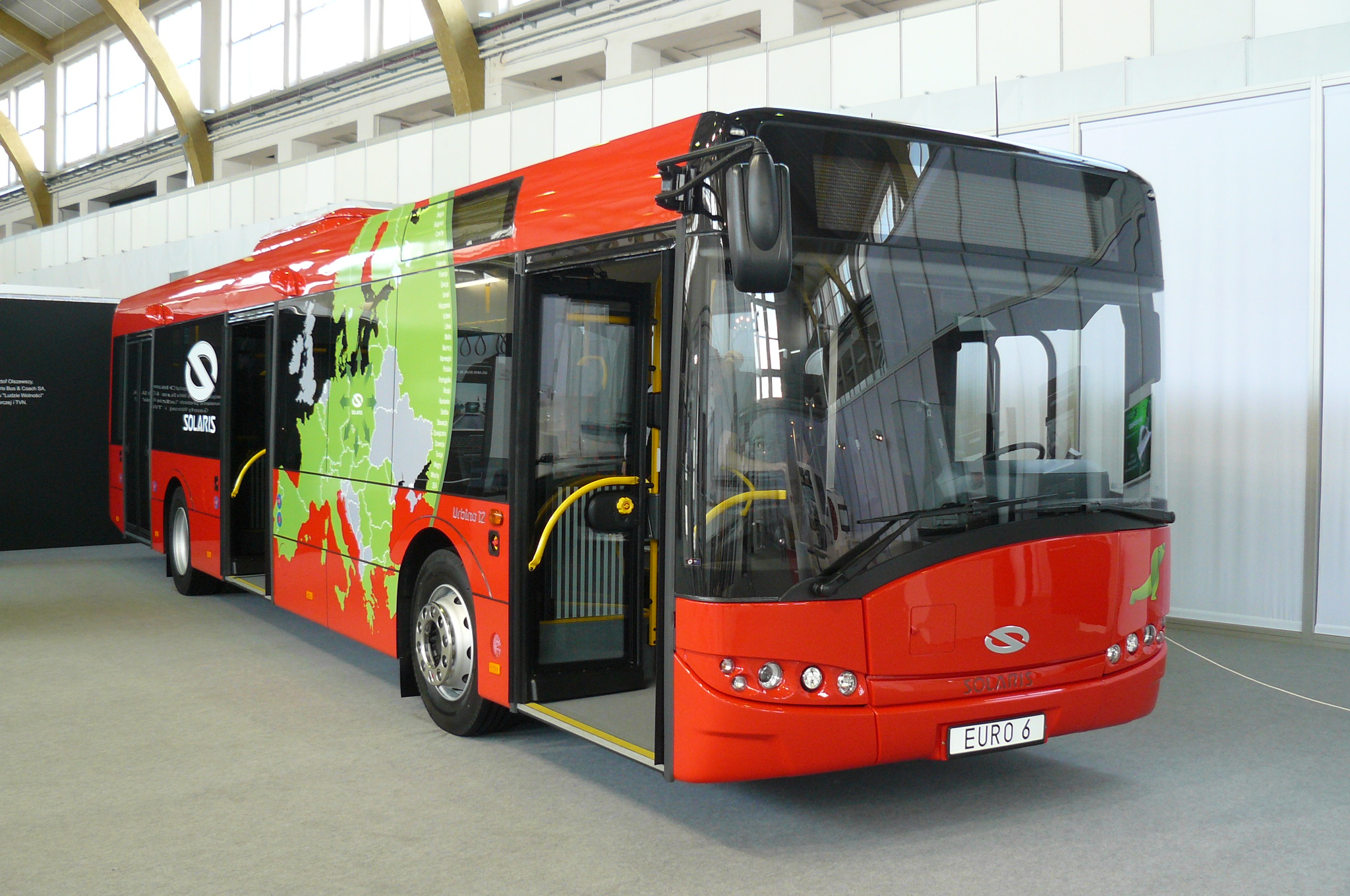 PWK Konkurencyjna Polska w Poznaniu, 2014r.